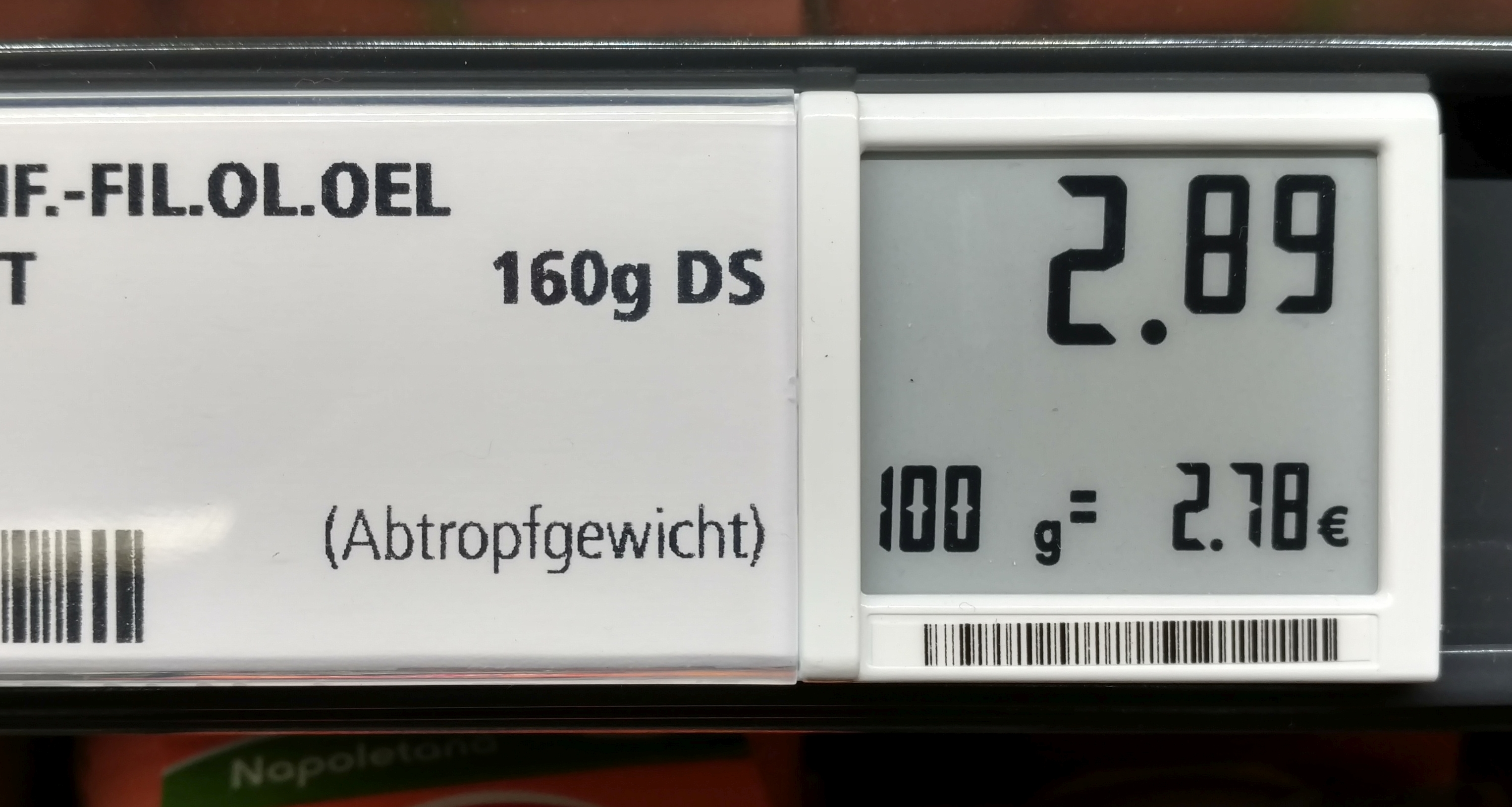 Elektronisches Preisschild, aufgenommen bei REWE